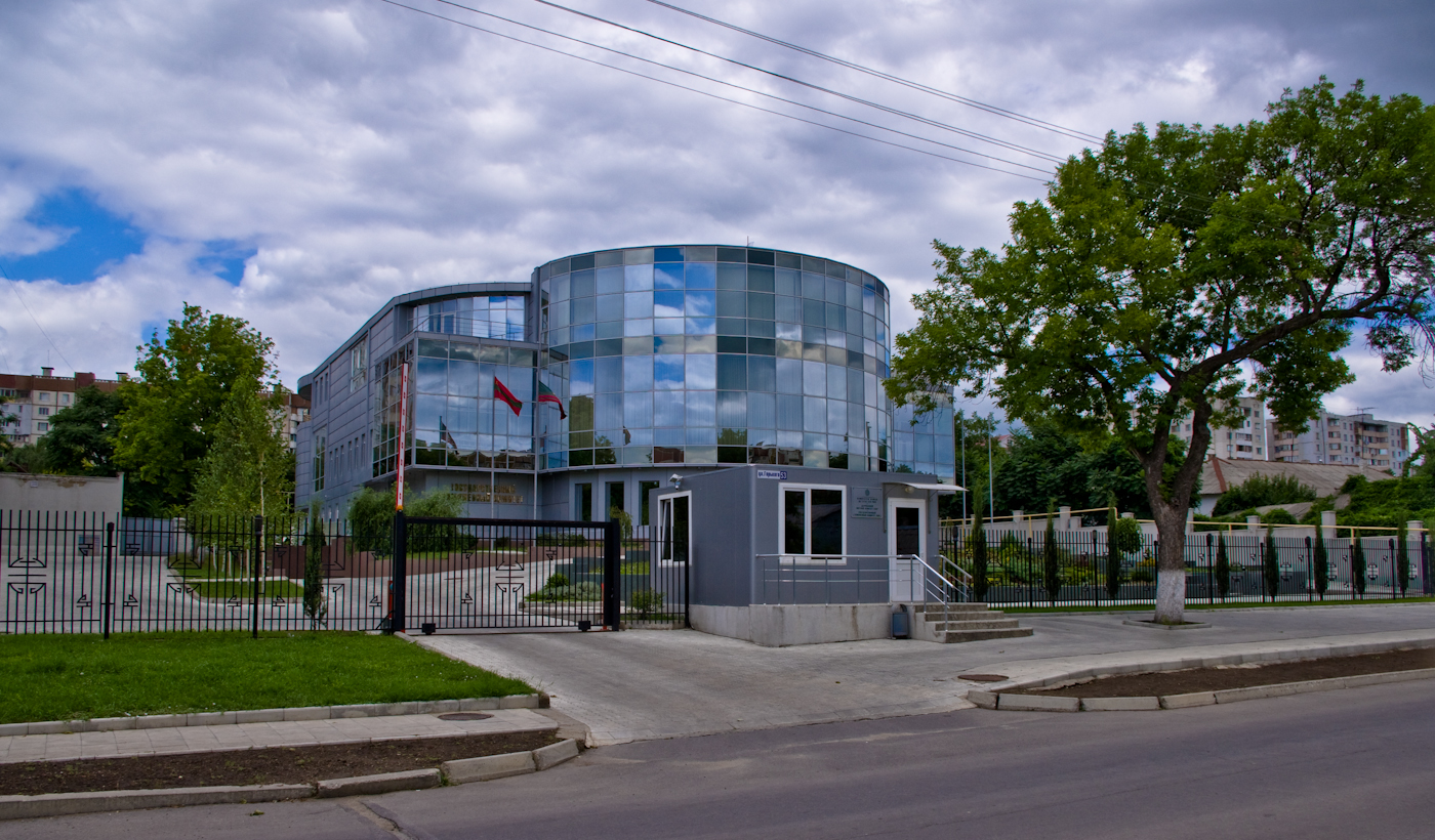 Здание Администрации Президента Приднестровья. Ранее - ГТК ПМР. Адрес: город Тирасполь, улица Горького 53.